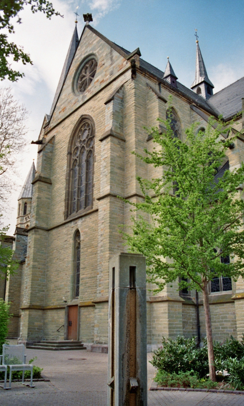 Katholische Pfarrkirche St. Kunibert Werl-Büderich.